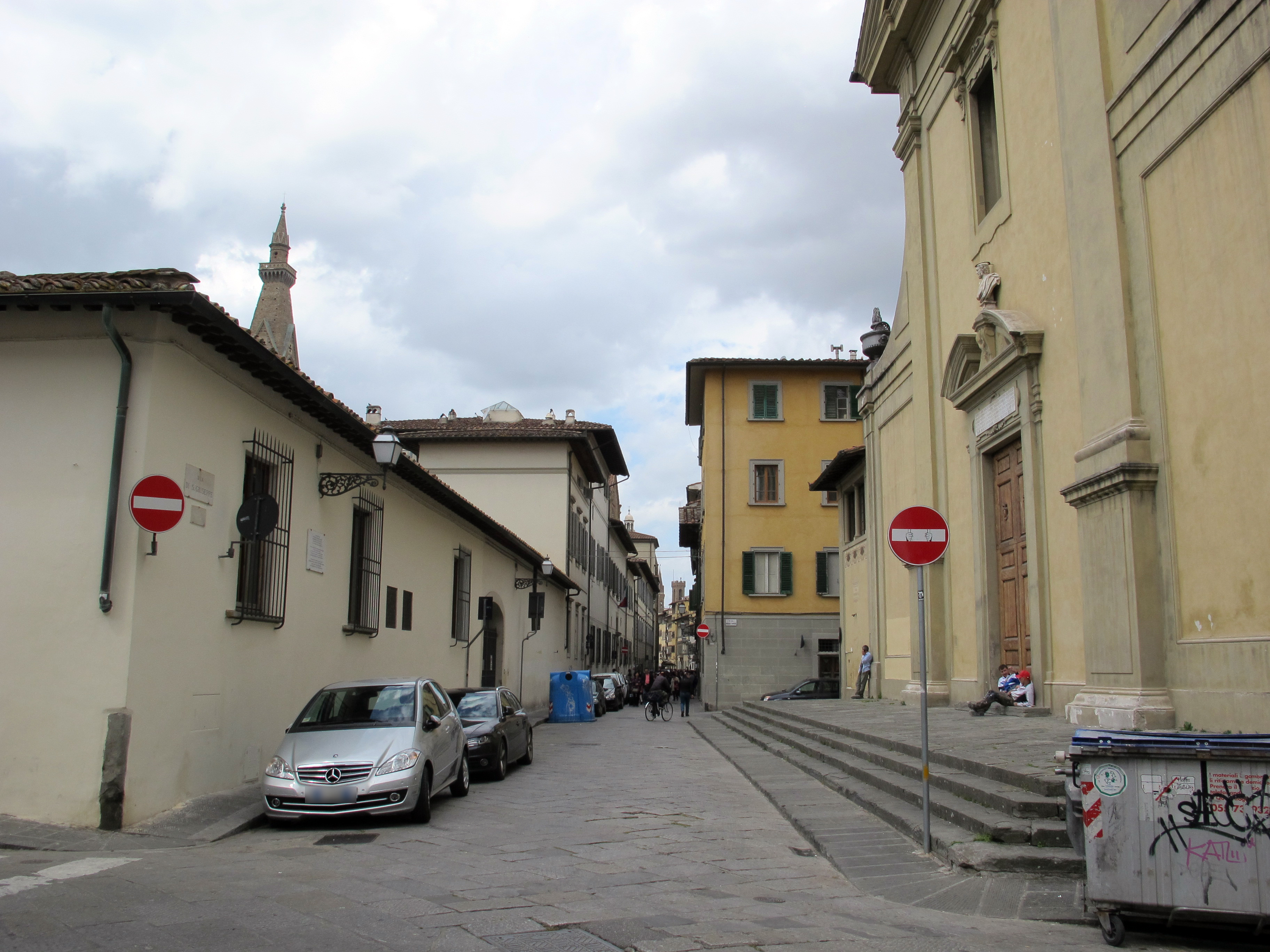 Via san giuseppe, veduta